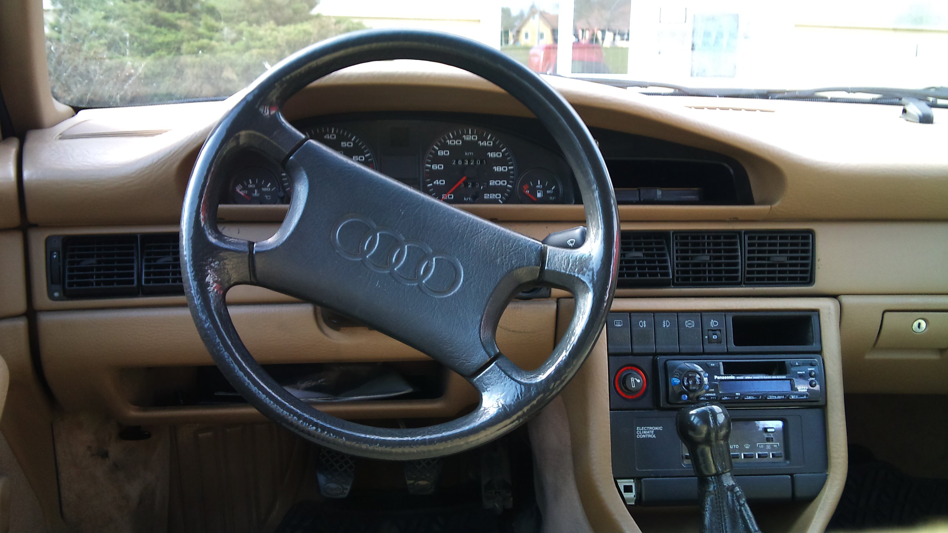 Innenraum eines Audi 100, Baujahr 1991